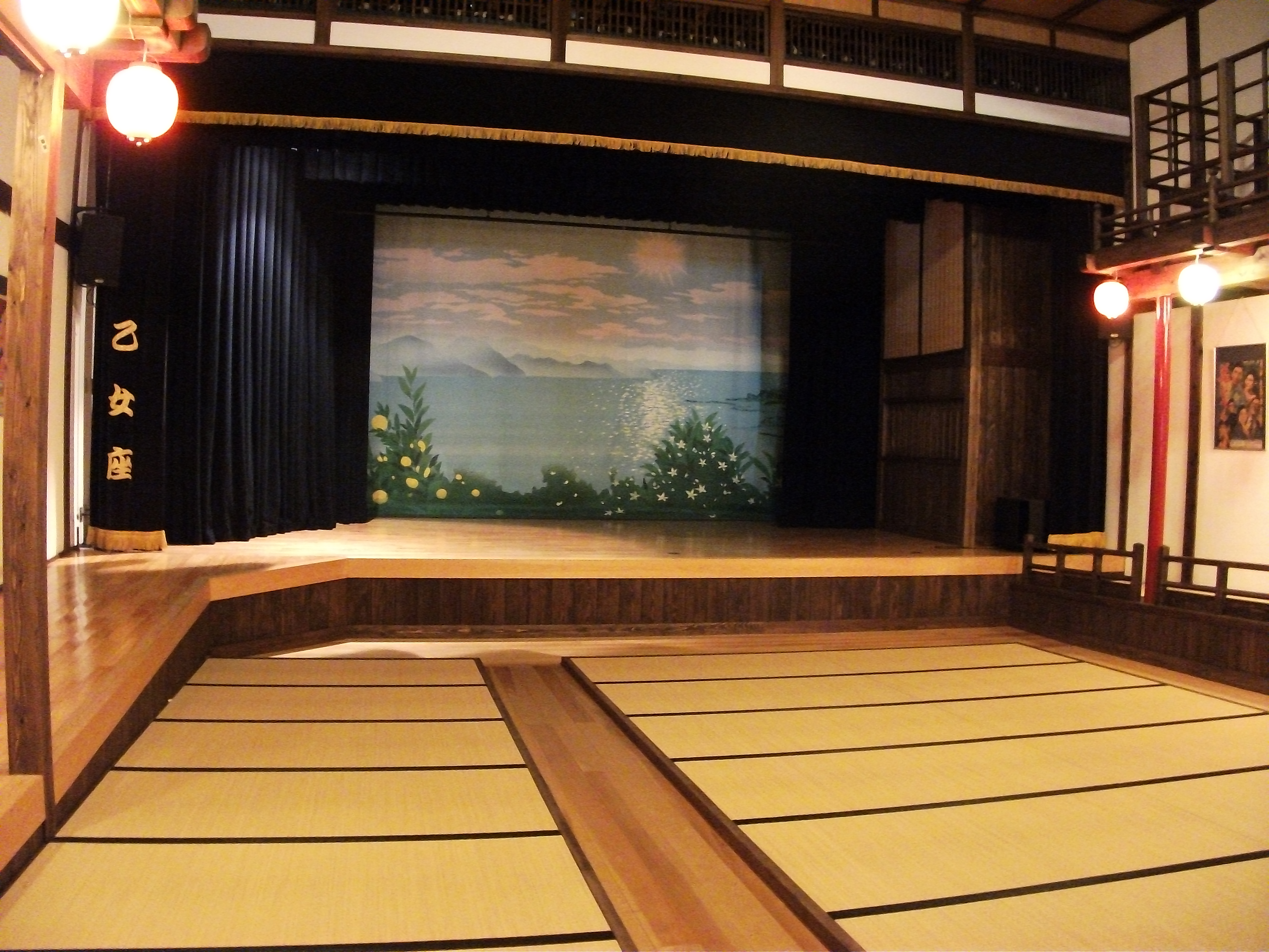 広島県呉市大崎下島の御手洗地区にある劇場、乙女座の舞台。